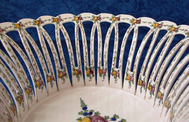 Détail d'un panier en faïence ajourée par Emile Tessier, Malicorne, France